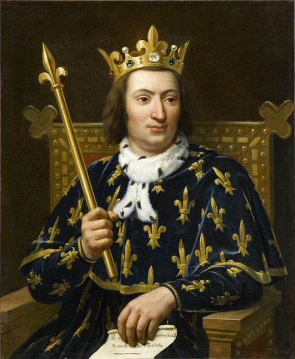 Charles V le sage, roi de France (1337-1380)